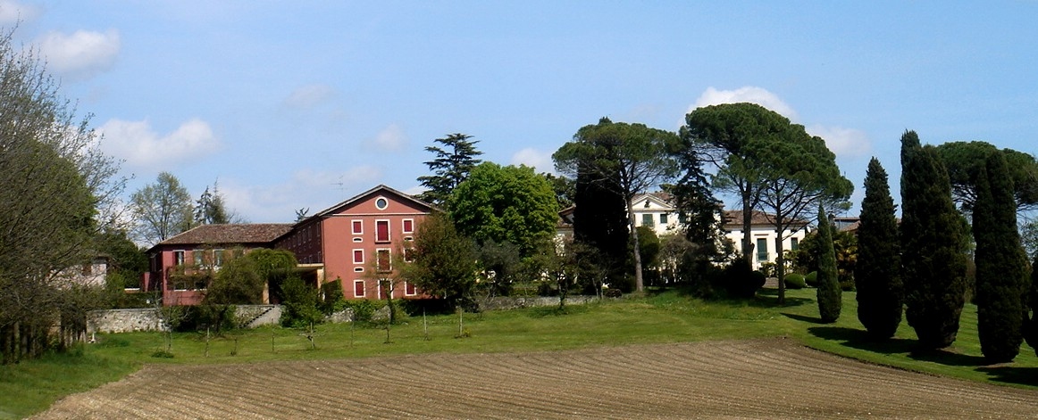 Colle Umberto (Treviso, Italia): veduta di Villa Morosini Lucheschi Valforte dal confine con la campagna sottostante il lato nord della pieve di Castello Roganzuolo.